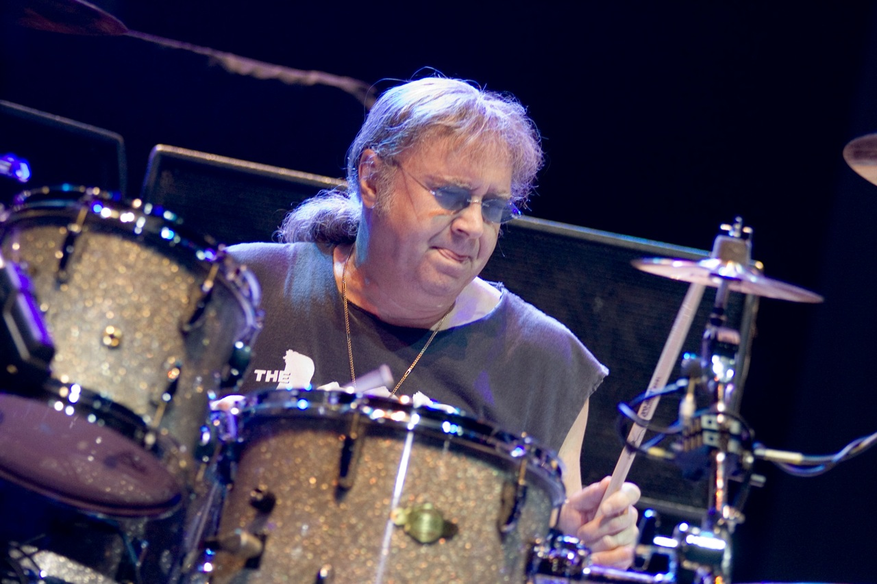 Deep Purple Live @ Via Funchal - 07/03/2009 - São Paulo, Brasil Fotógrafo: Alexandre Cardoso